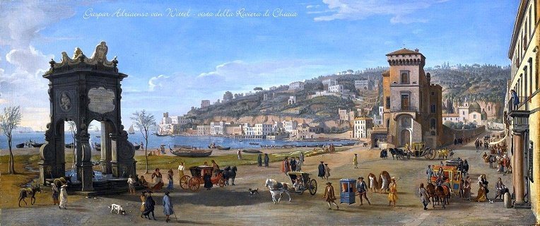 Napoli, veduta di Posillipo, Mergellina e la Torretta dalla Riviera di Chiaia. In primo piano la distrutta Fontana di Medinacoeli. Gli archi erano decorati al centro da una lapide dedicata al viceré e ai lati da oculi contenenti due busti (presumibilmente i busti del viceré duca di Medinacoeli e del re Carlo II di Spagna); l’intera struttura era sormontata da tre stemmi (del re, del viceré e della città). Sulla lapide si legge chiaramente "Carolus II dei gratia rex...". Asta Sotheby’s a New York 28 gennaio 2016. Collezione privata.